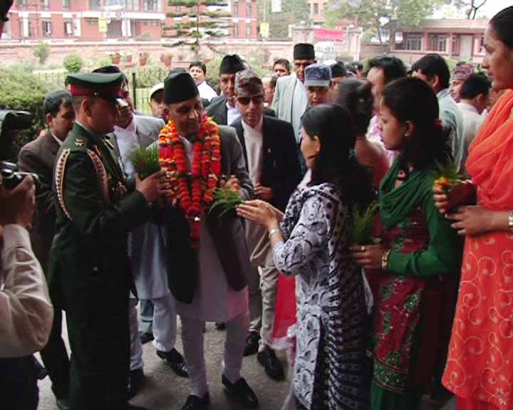 नेपाली: प्रधान न्यायाधिश भएपछि खिलराज